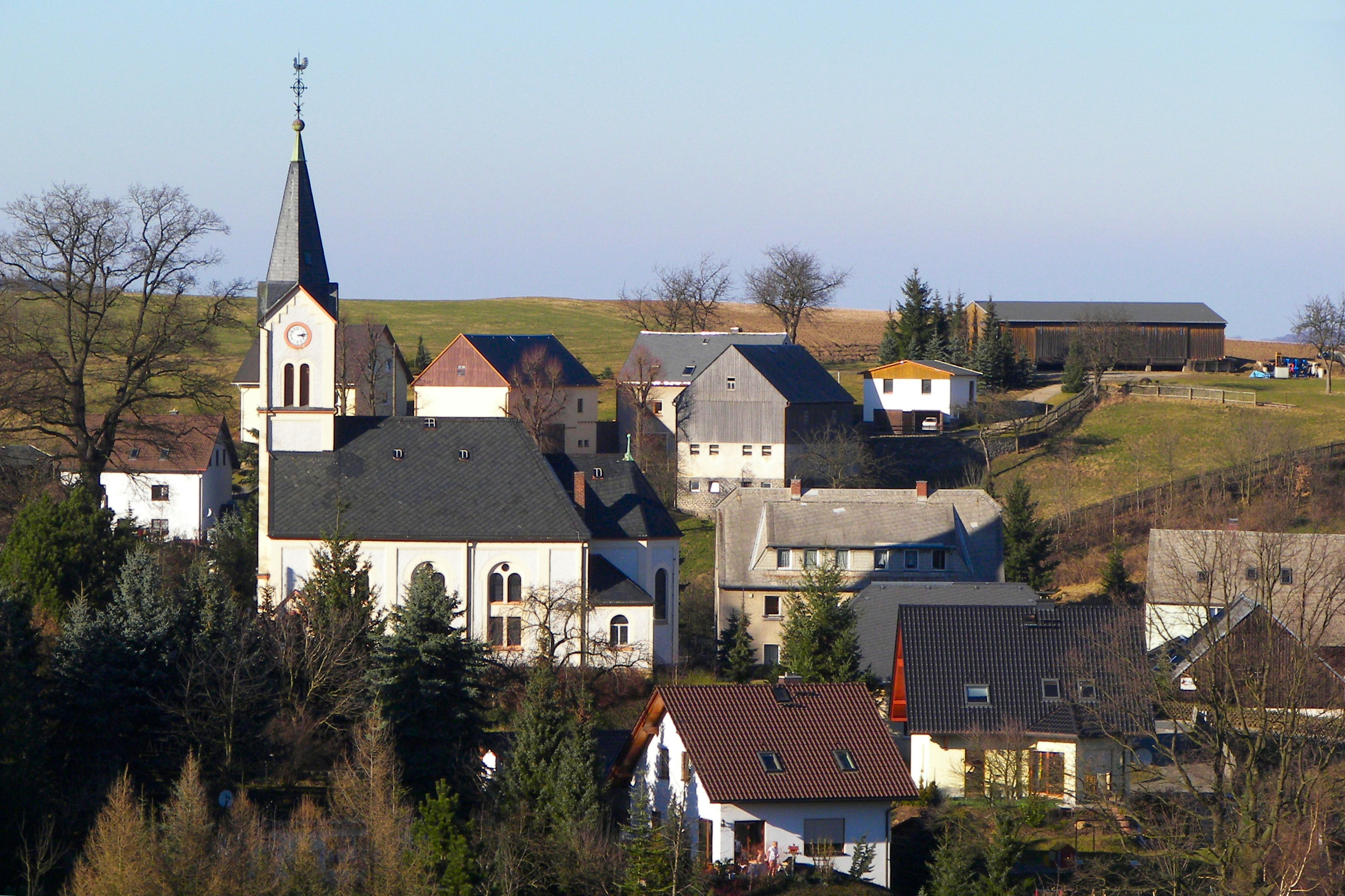 Kirche Witzschdorf